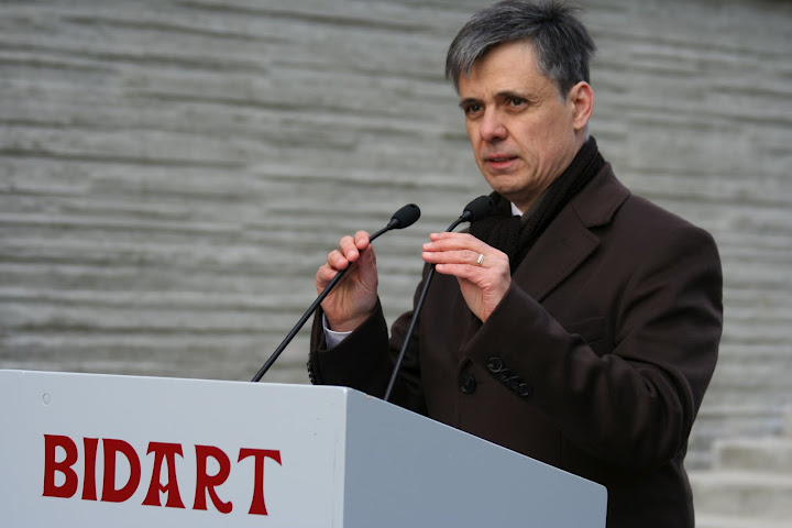 Photo du Préfet des Pyrénées-Atlantiques en février 2012.